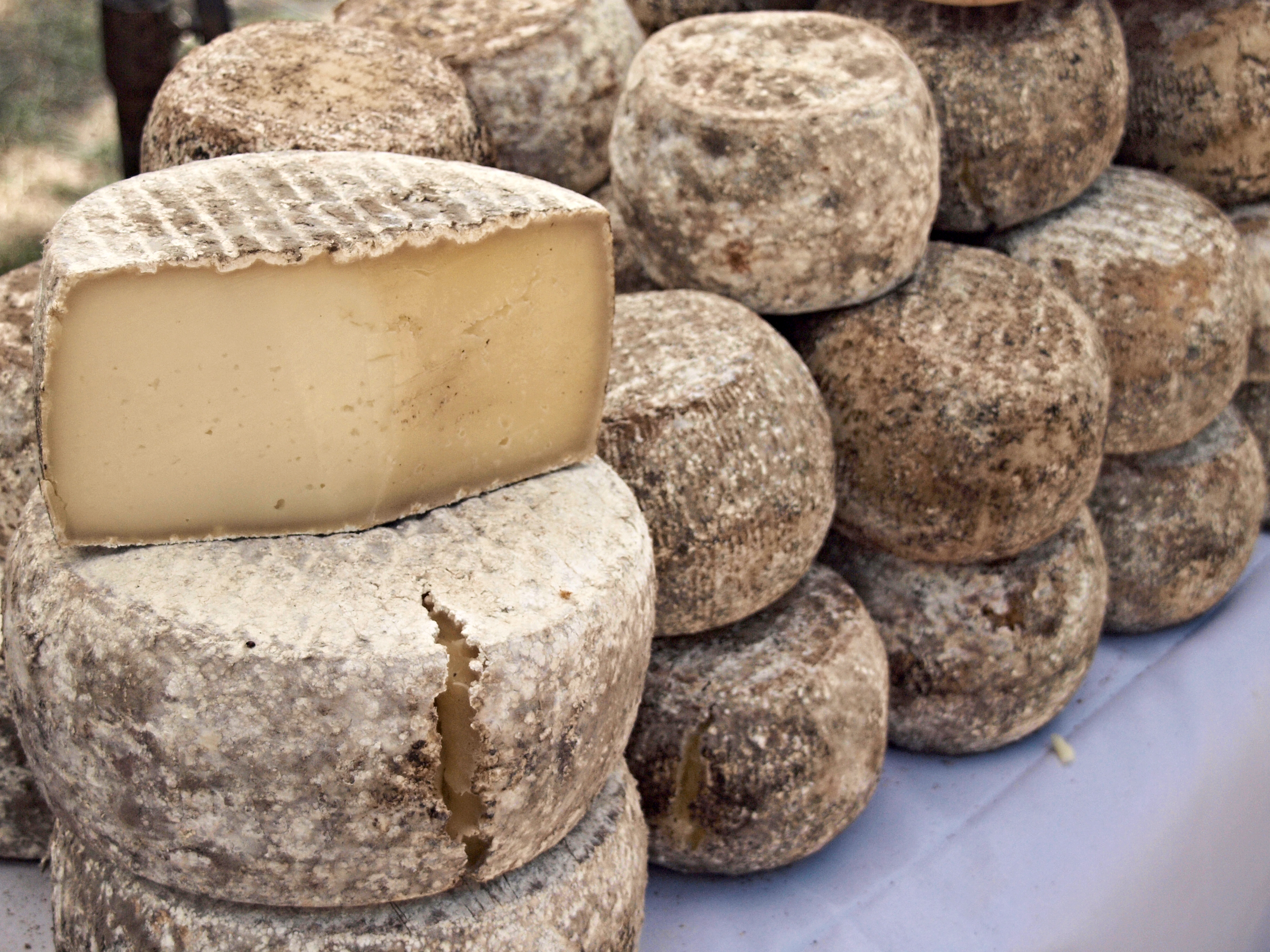 Calenzana (Corsica) - Fromages fermiers de Sartène (sartinesu) présentés à la Foire du Fromage 2010 (fiera di U Casgiu)